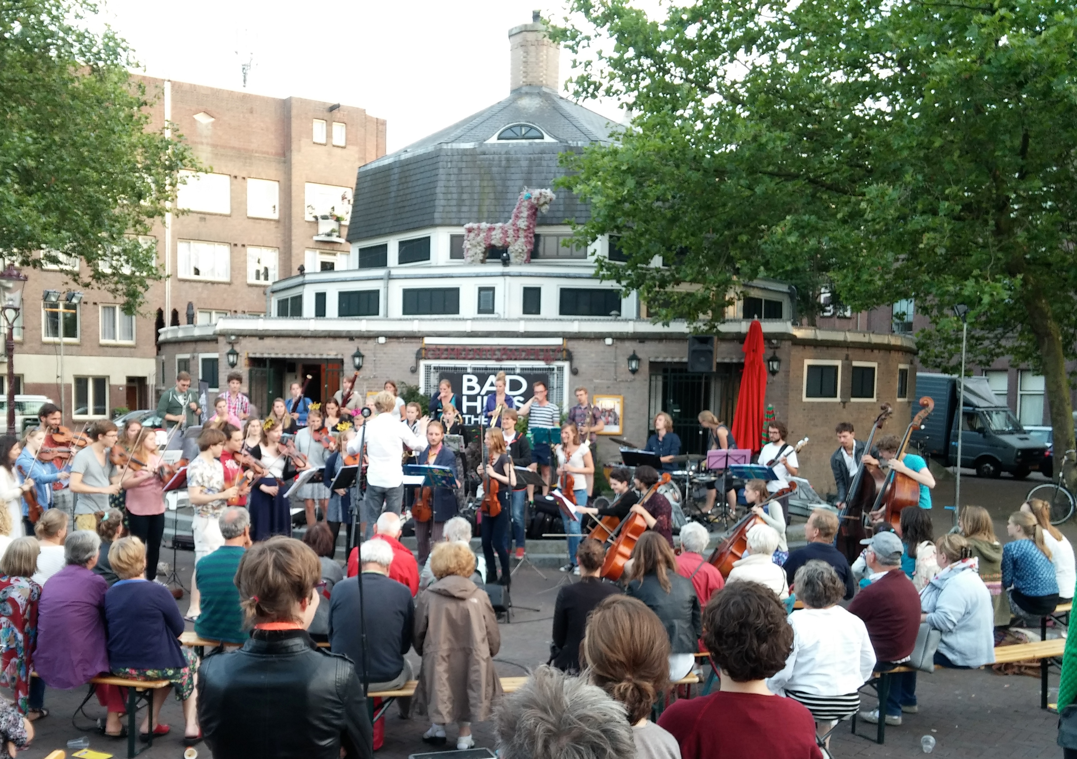 Ricciotti Ensemble tijdens een openluchtconcert voor het Badhuistheater